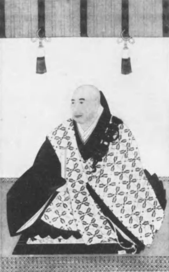 尊超入道親王の肖像(モノクロ)。